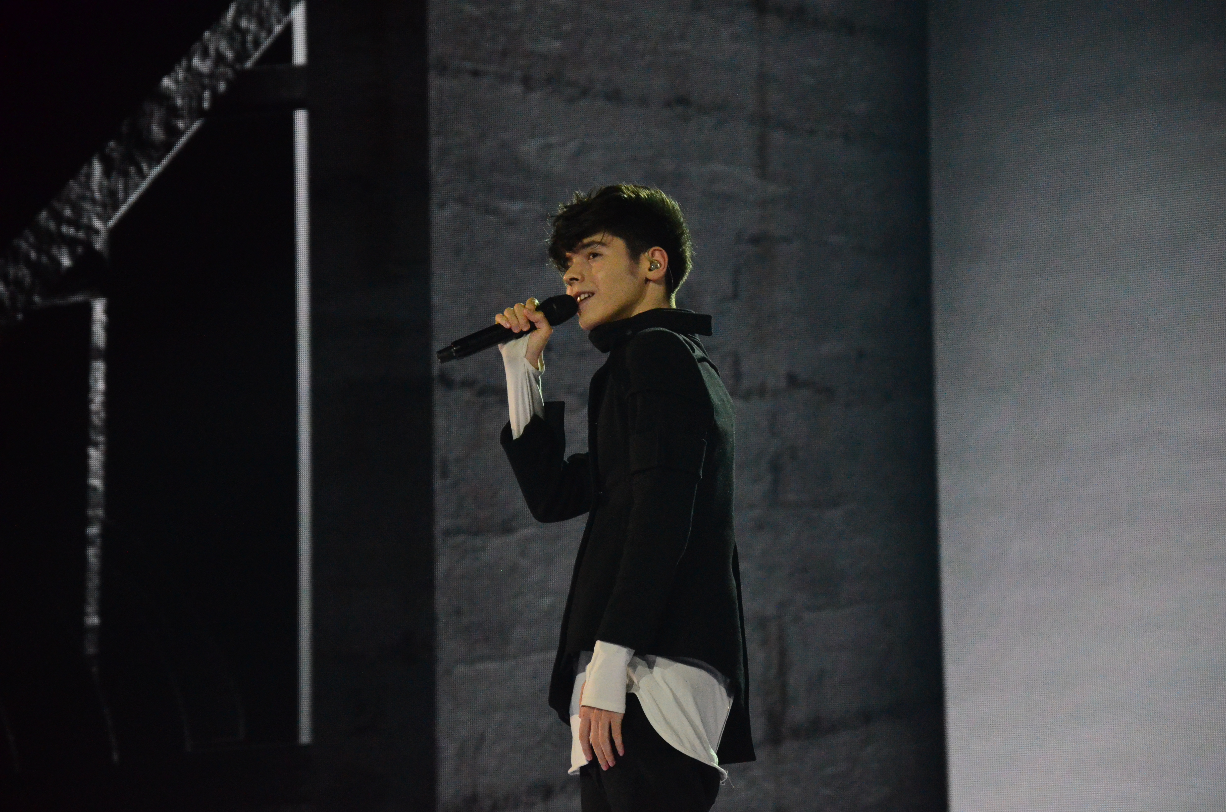 12 травня. Генеральна репетиція фіналу Євробачення 2017. Kristian Kostov (Bulgaria)